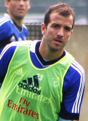 Rafael van der Vaart beim HSV-Training am 25. Juli 2013.